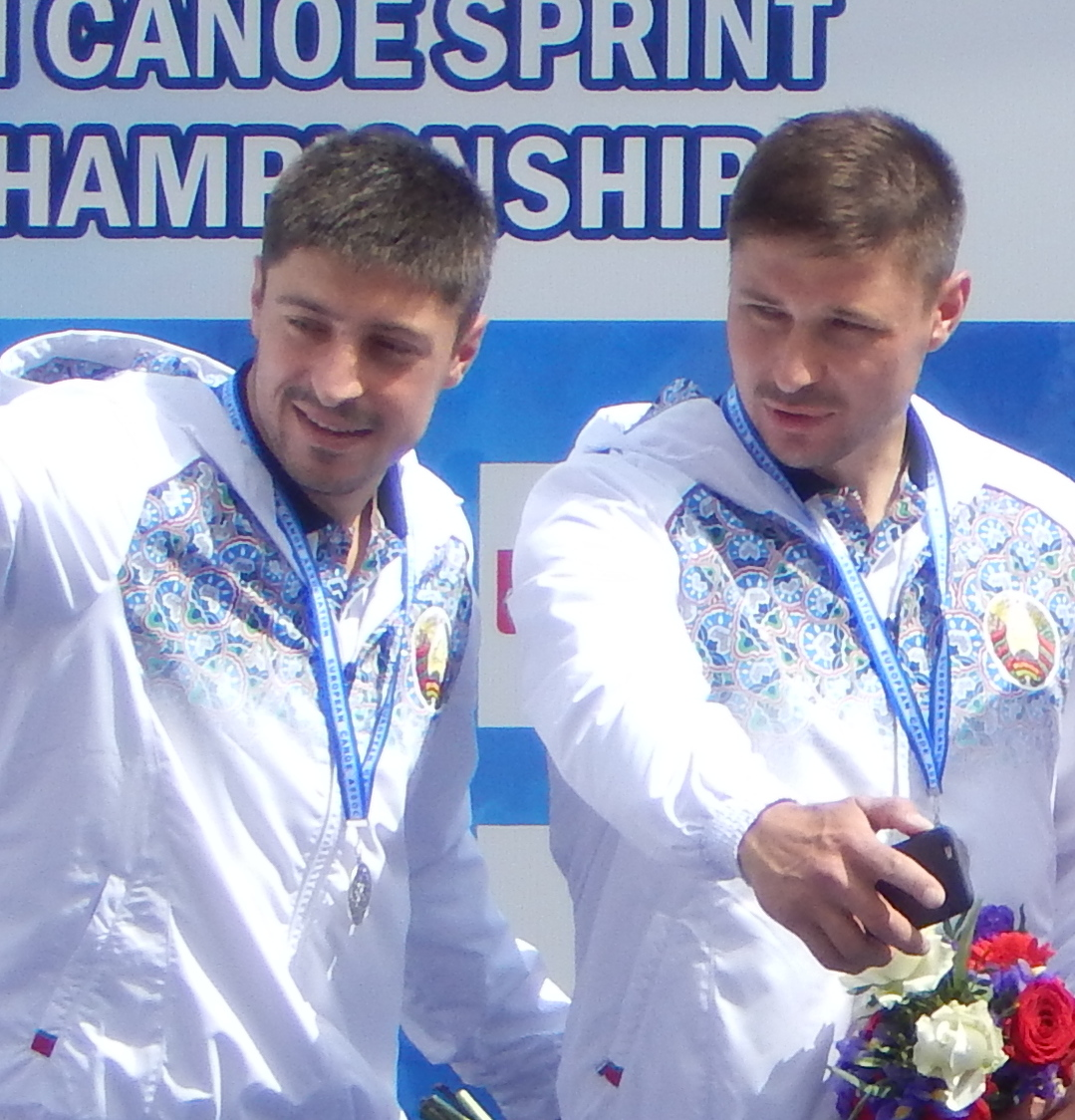 Церемония награждение мужчин в каноэ-двойке 1000 м